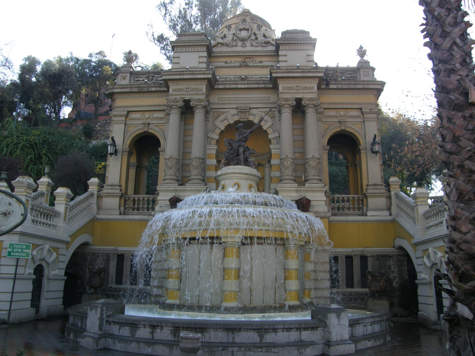 Cerro Santa Lucia, en la foto se aprecia la fuente y al centro una imagen del dios griego Neptuno.